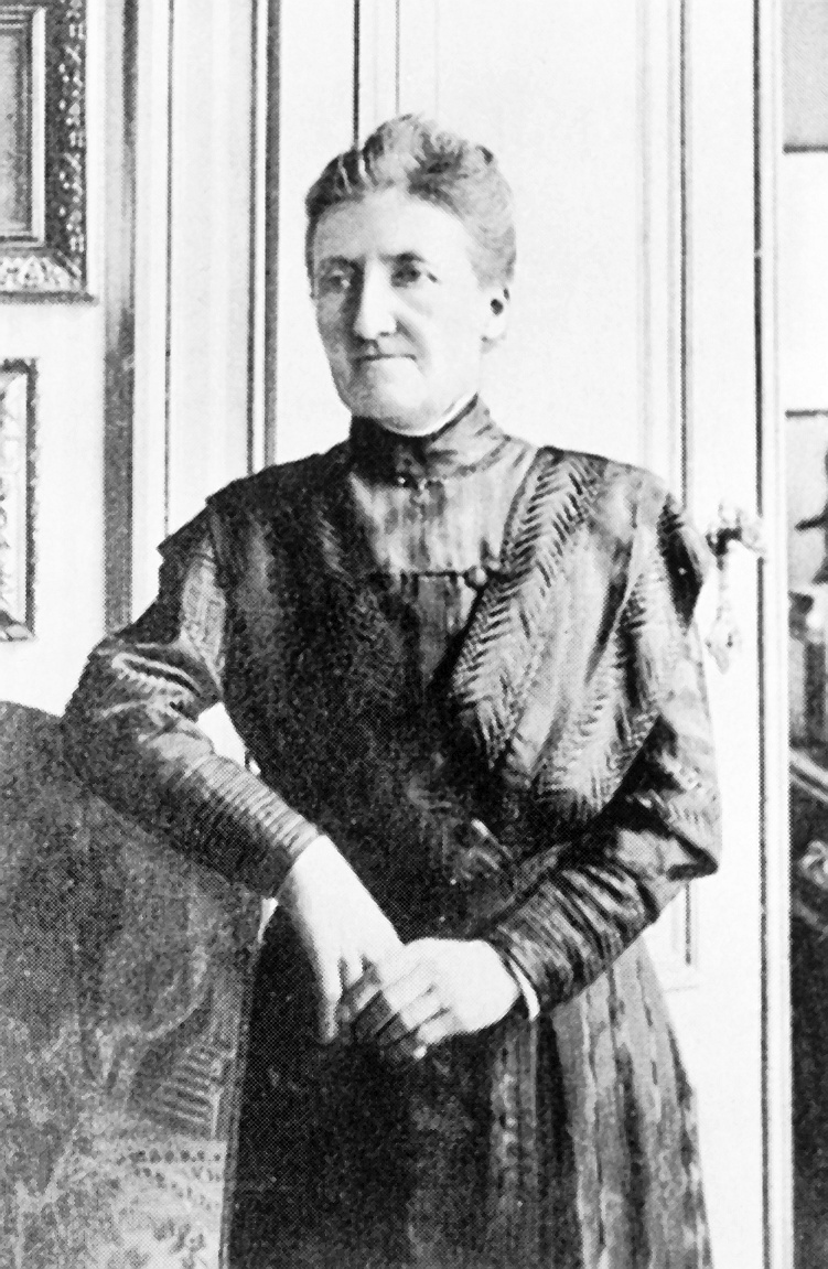 Marie Popelin (1846-1923) Avocate et féministe belge